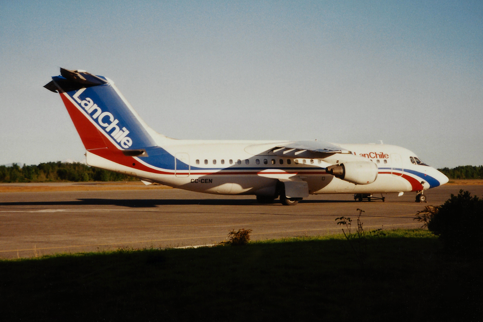 Puerto Montt - El Tepual (PMC / SCTE) Chile 3.1995